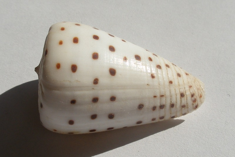 Conus eburneus